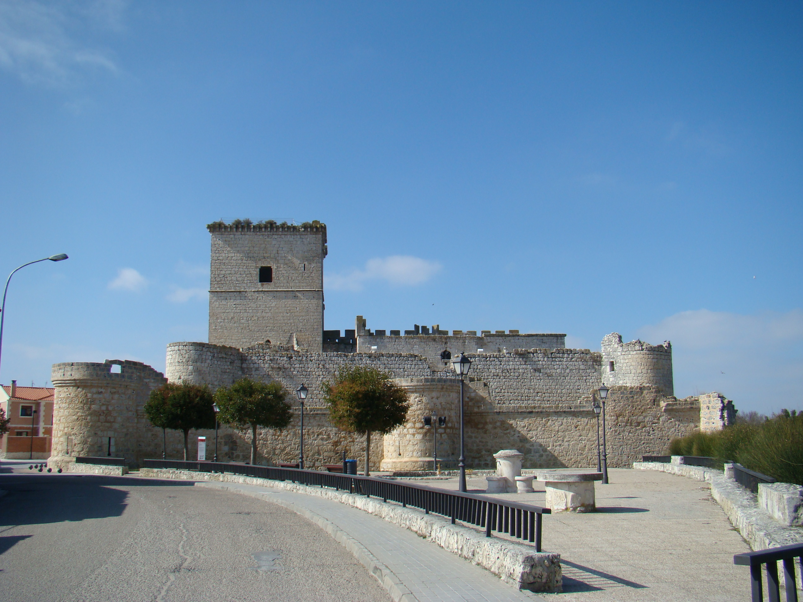 Vista del castillo de Portillo en la localidad de Portillo (Valladolid, España). El edificio que se ve es del siglo XV.